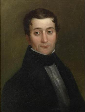 Self-portrait